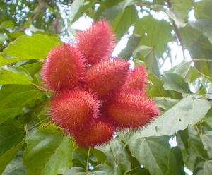 Fruktoj el Bixa orellana